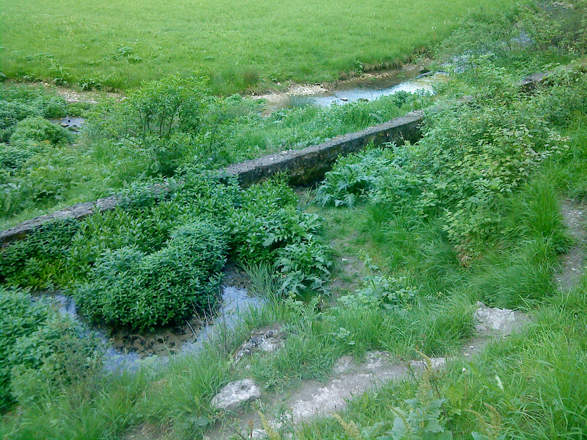 An der Leinleiterquelle